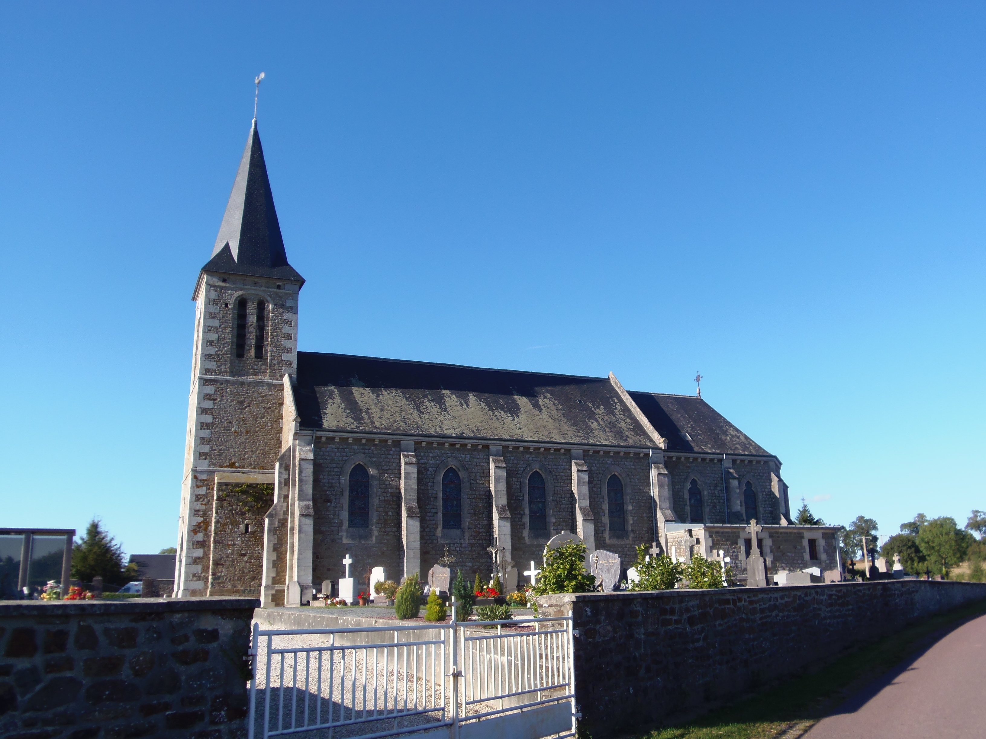 Giéville (Normandie, France). L'église Saint-Martin.